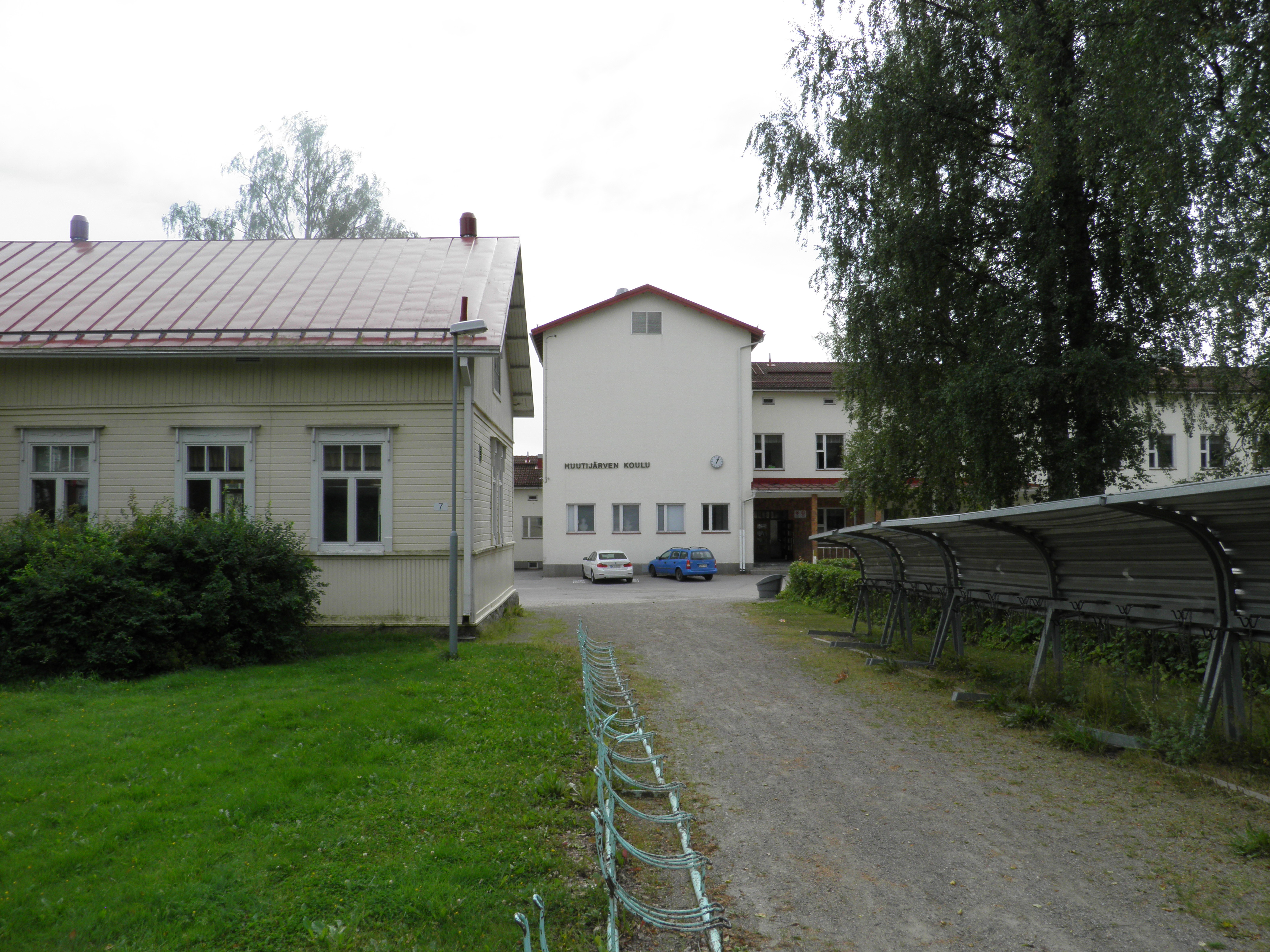 Huutijärven koulu Kangasalla.